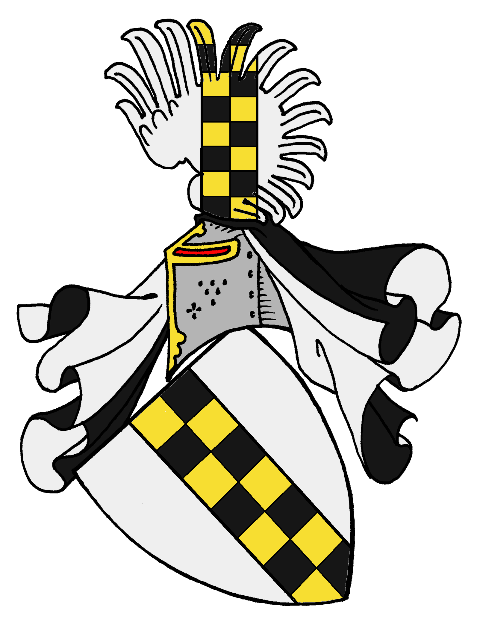 Stammwappen der Breuner, eines österreichischen Adelsgeschlechts.